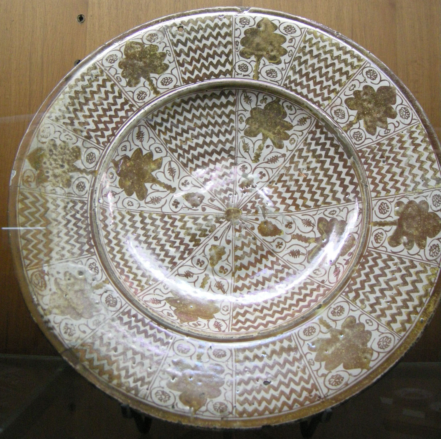 C.sf., manises (valencia), piatto, XVi sec.